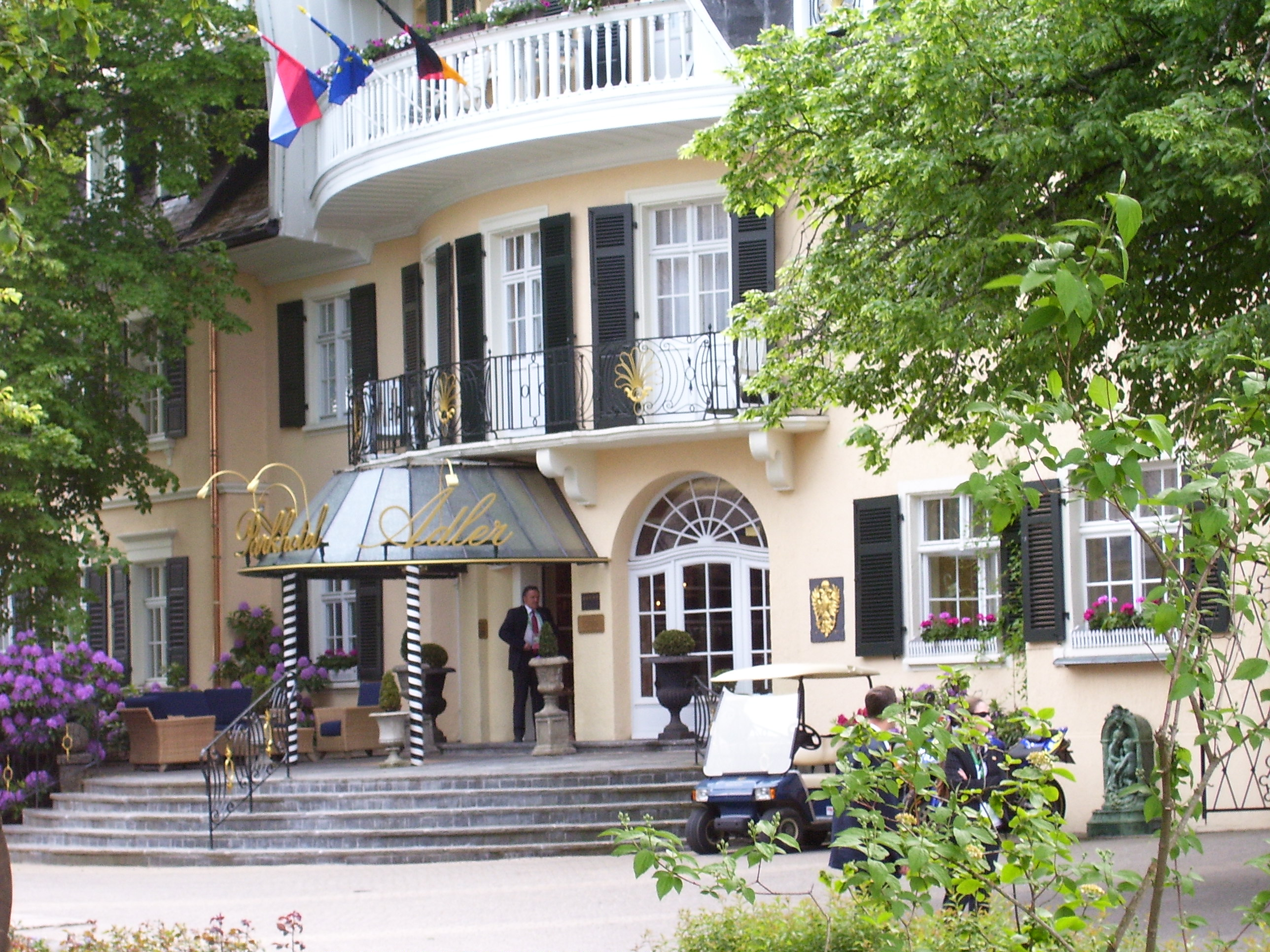 Eingang Parkhotel Adler in Hinterzarten